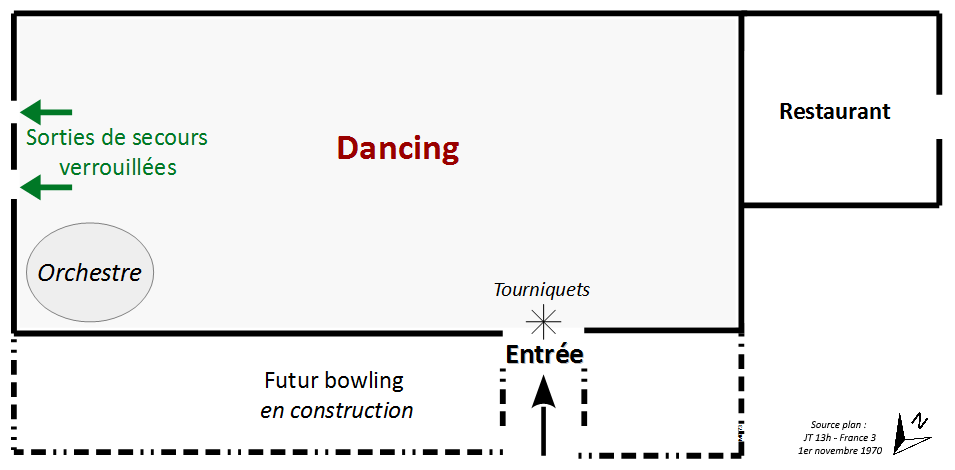 Plan de la situation au moment de l'incendie du 5-7 (Saint-Laurent-du-Pont (38)).